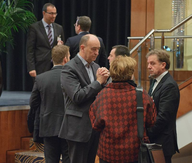 NRW-Bewerbung „Schaufensterregion für Elektromobilität“ 15.12.2011 Schaufenster Elektromobilität Flickr tags: Schaufenster Elektromobilität; Düsseldorf; Maritim Hotel; EnergieAgentur.NRW; Bewerbung; Klimaschutz; EANRW; NRW; Elektromobilität; Route der Elektromobilität; Energiewende; Klimawandel; Johannes Remmel; Svenja Schulze